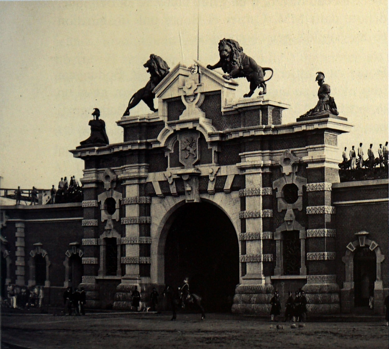 ancienne enceinte fortifiée d'Anvers.